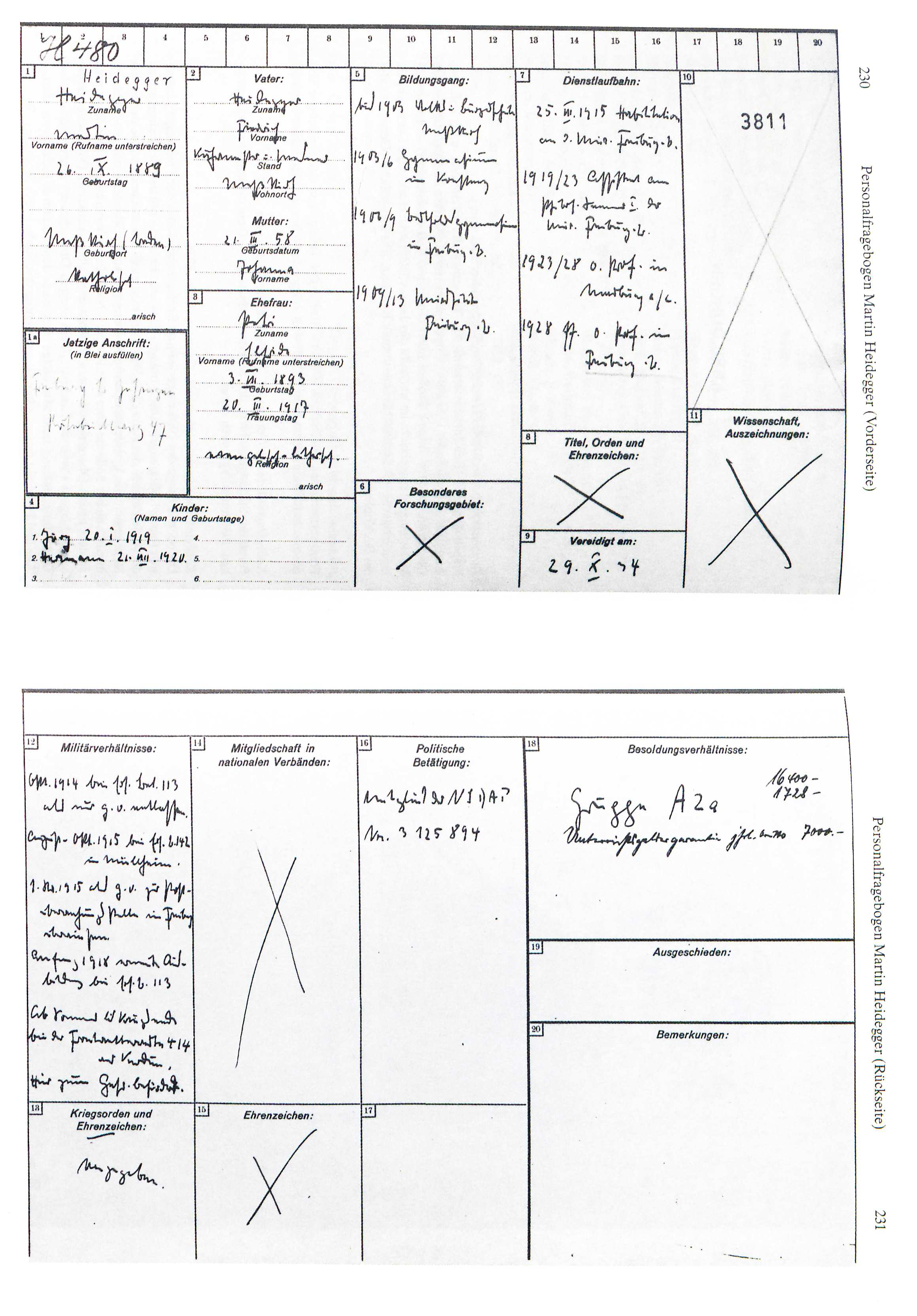 Von Heidegger ausgefüllter Personalfragebogen des Reichsministerium für Wissenschaft, Erziehung und Volksbildung. Vorderseite und Rückseite.